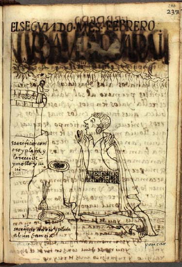 Hatun Pocoy